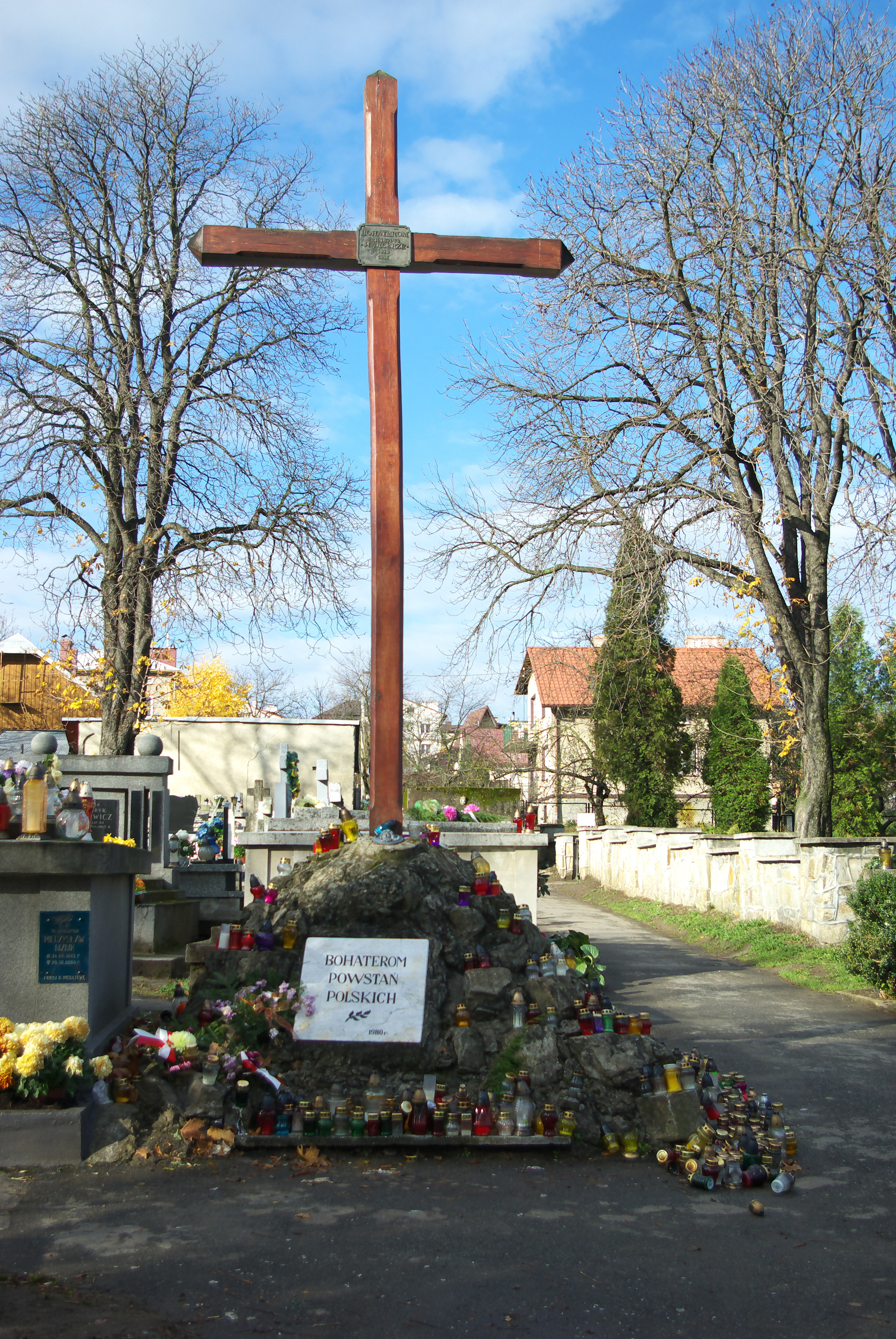 Krzyż Powstańców Cmentarz Centralny w Sanoku